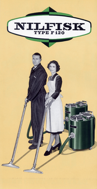 Nilfisk Type F 120.